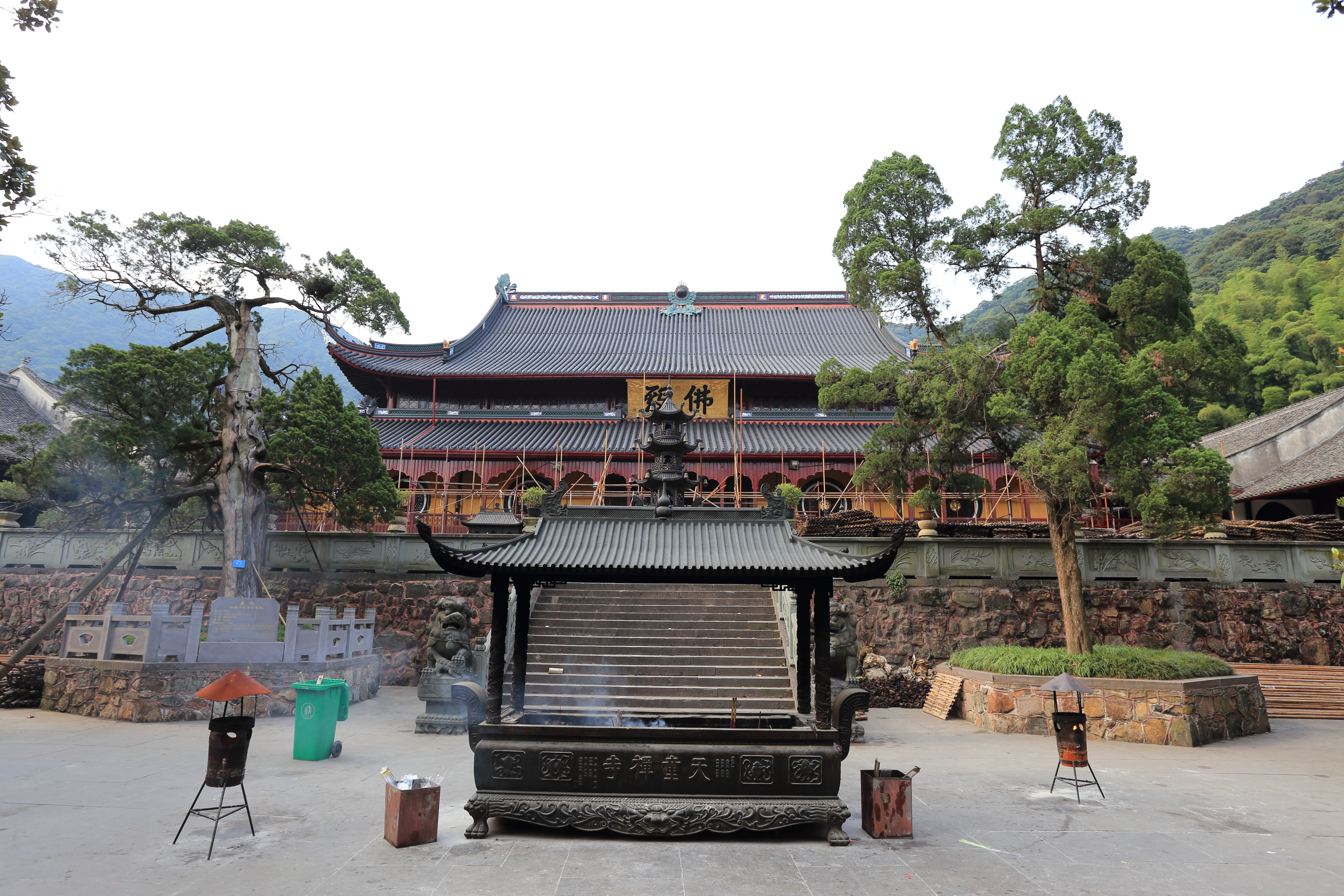 宁波天童寺 —— 佛殿